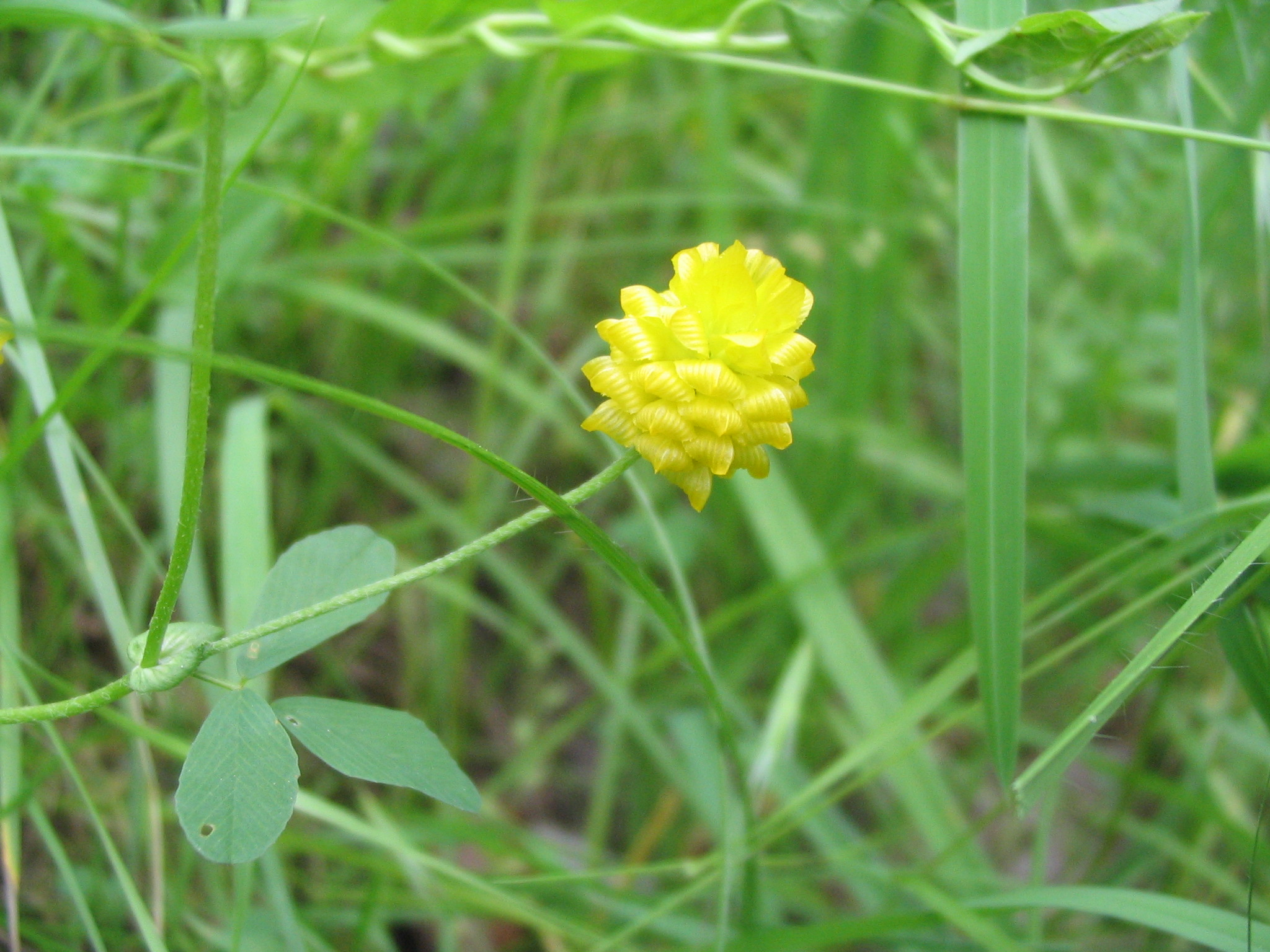 Description: Trifolium campestre Photo: Alain Jotterand, Lausanne (CH), talus de route, 19.5.2006